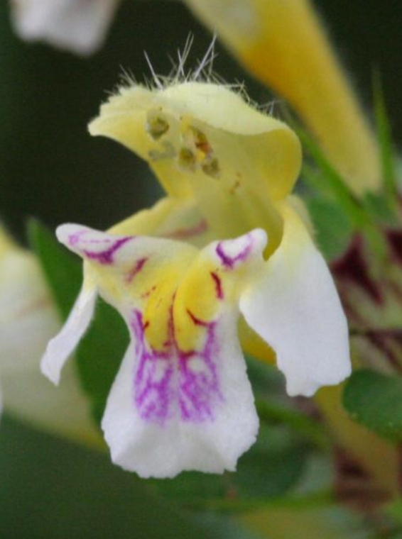 Galeopsis speciosa